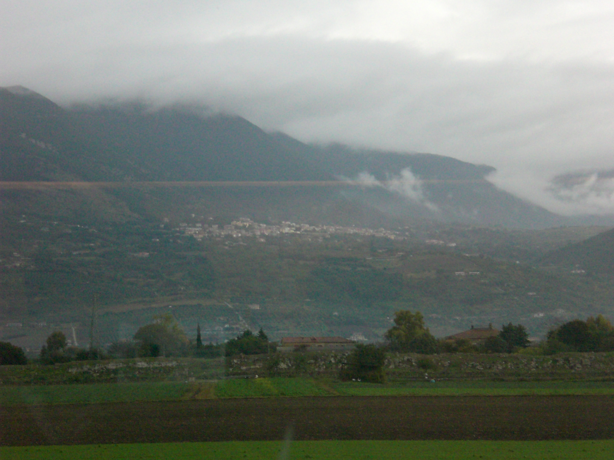 Capaccio vista da Paestum